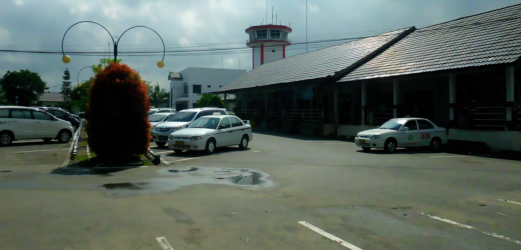 沙馬林達機場客運大樓